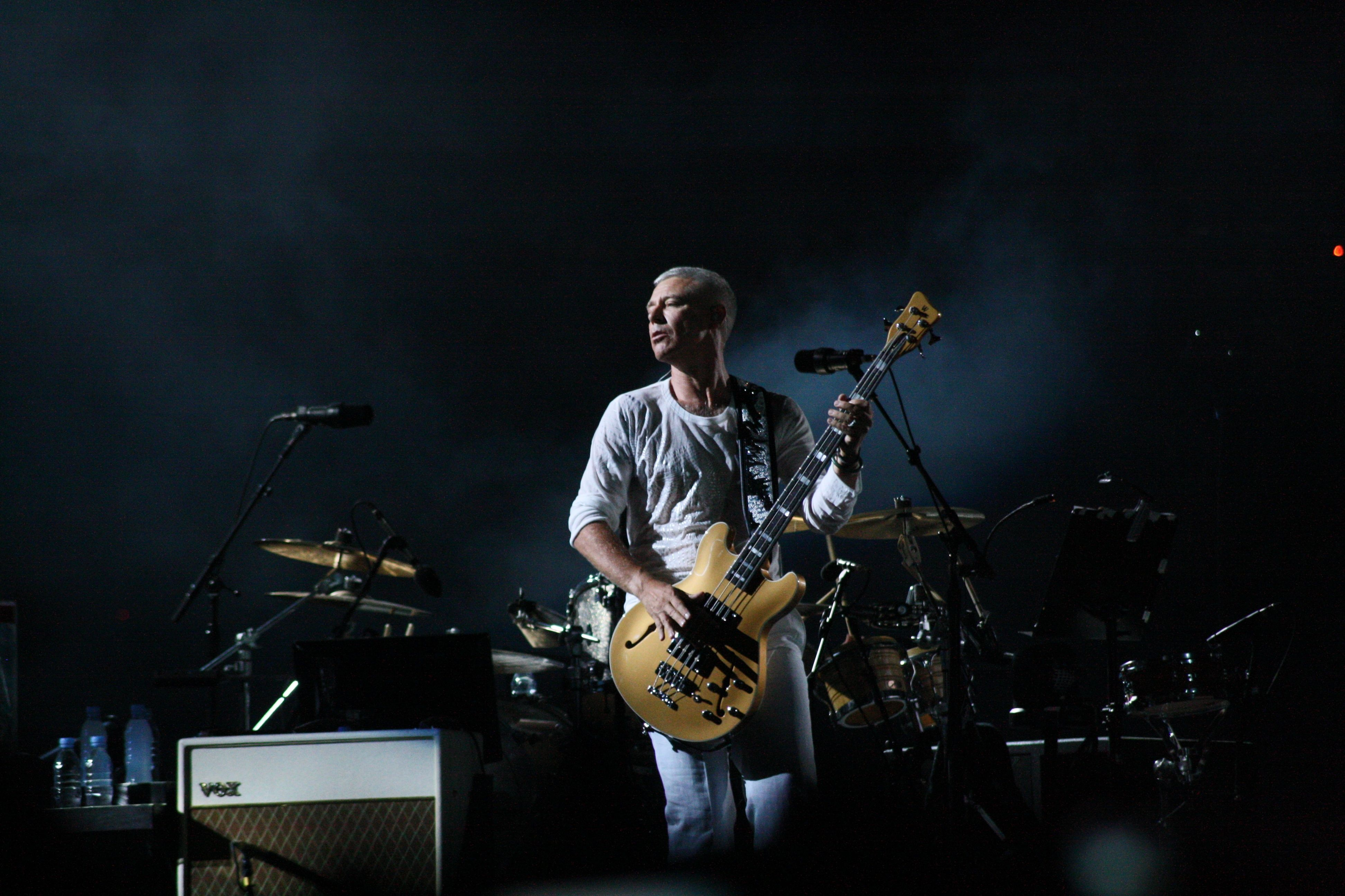 Adam Clayton durante il concerto degli U2 allo Stadio Olimpico di Torino il 06 agosto 2010